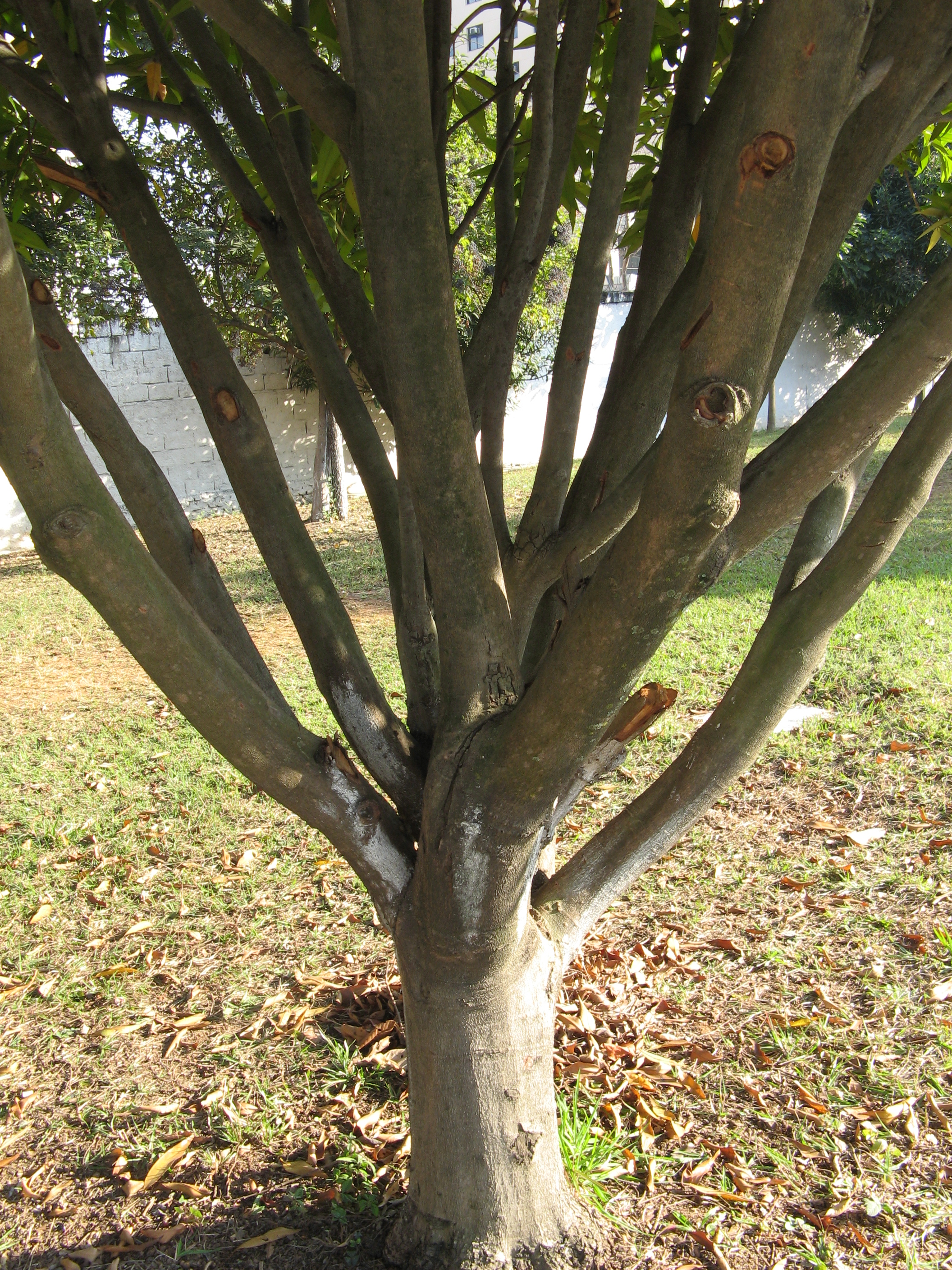 tronco de andiroba atacado pela lagarta das meliaceas